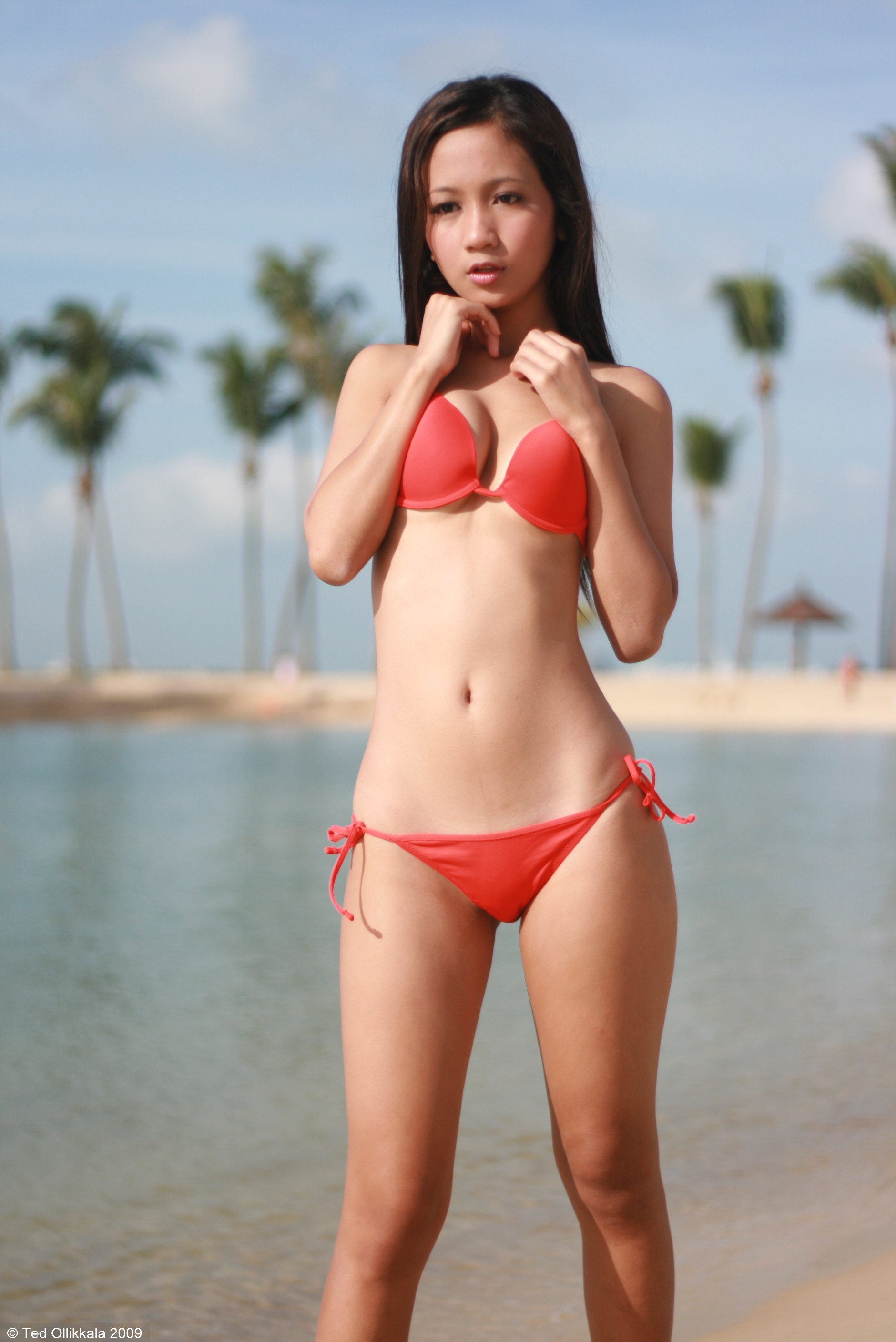 Bikini shoot, Tanjong Beach, Singapore.